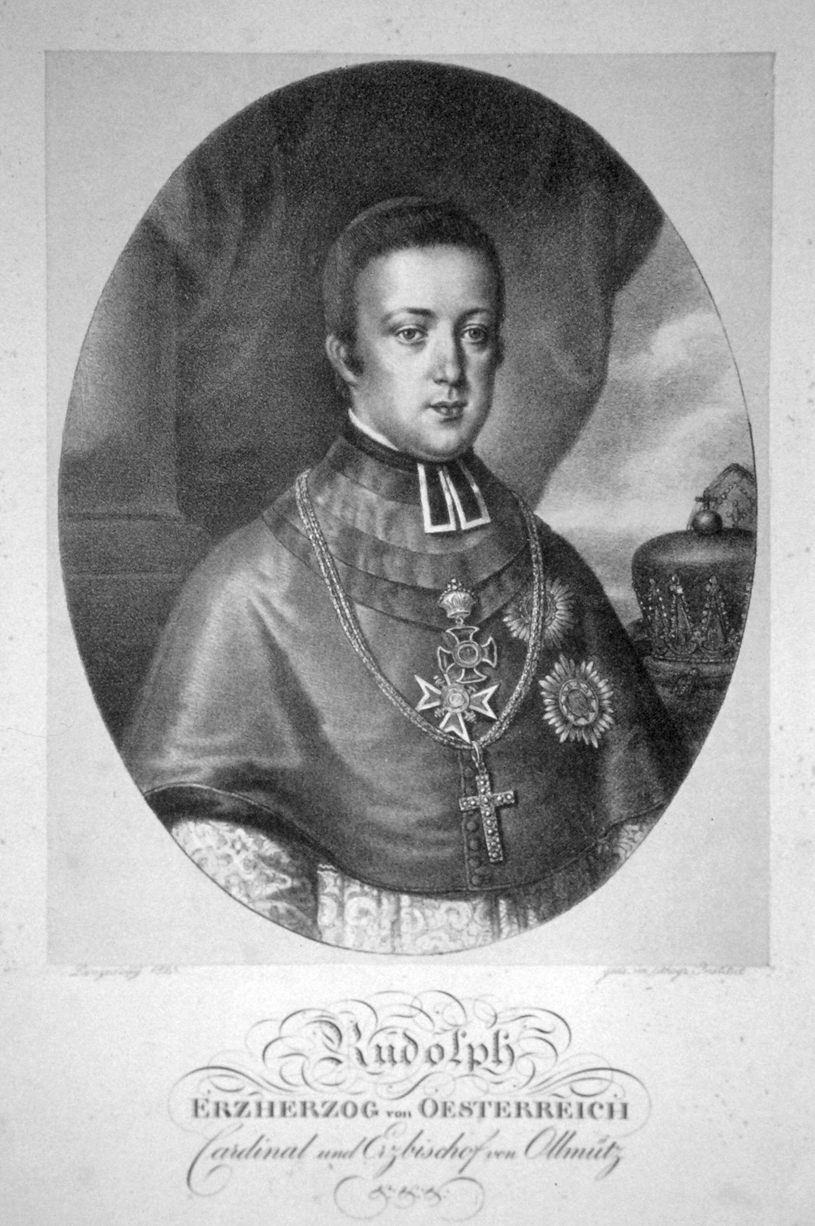 Erzherzog Rudolf von Österreich, (1788-1831), Erzbischof von Olmütz, Kardinal, Komponist und Förderer Beethovens. Lithographie von Josef Lanzedelli d. Ä., 1823